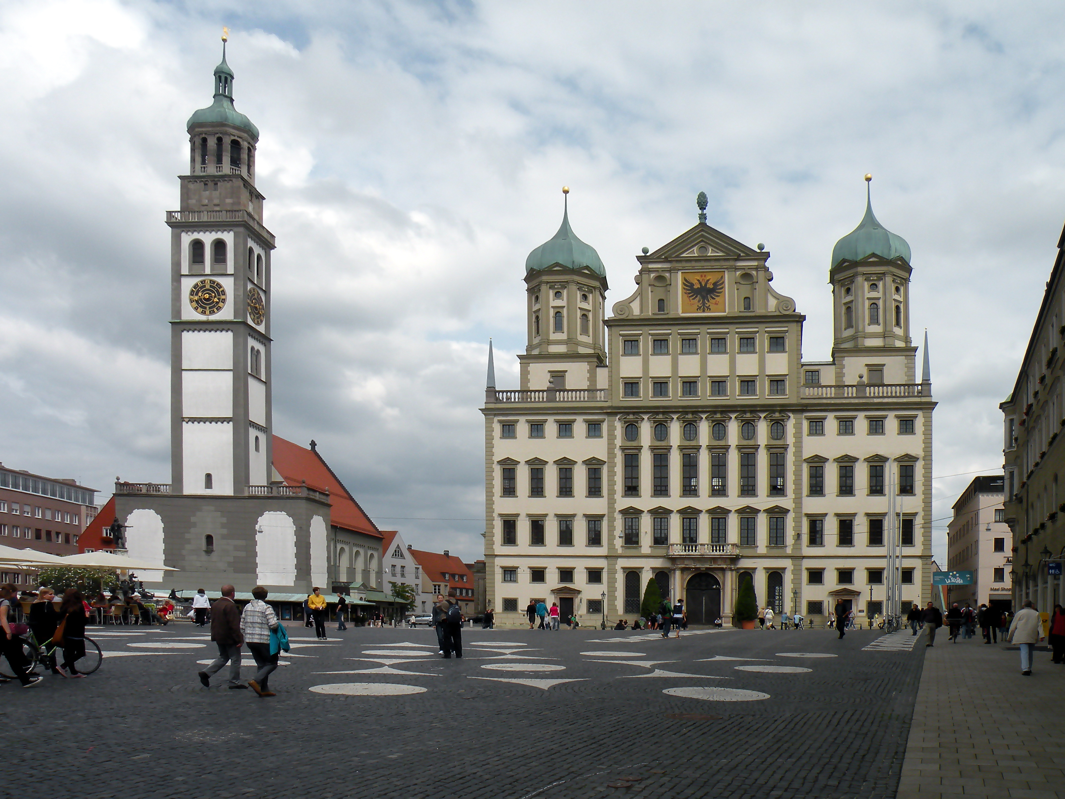 Augsburger_Rathausplatz.